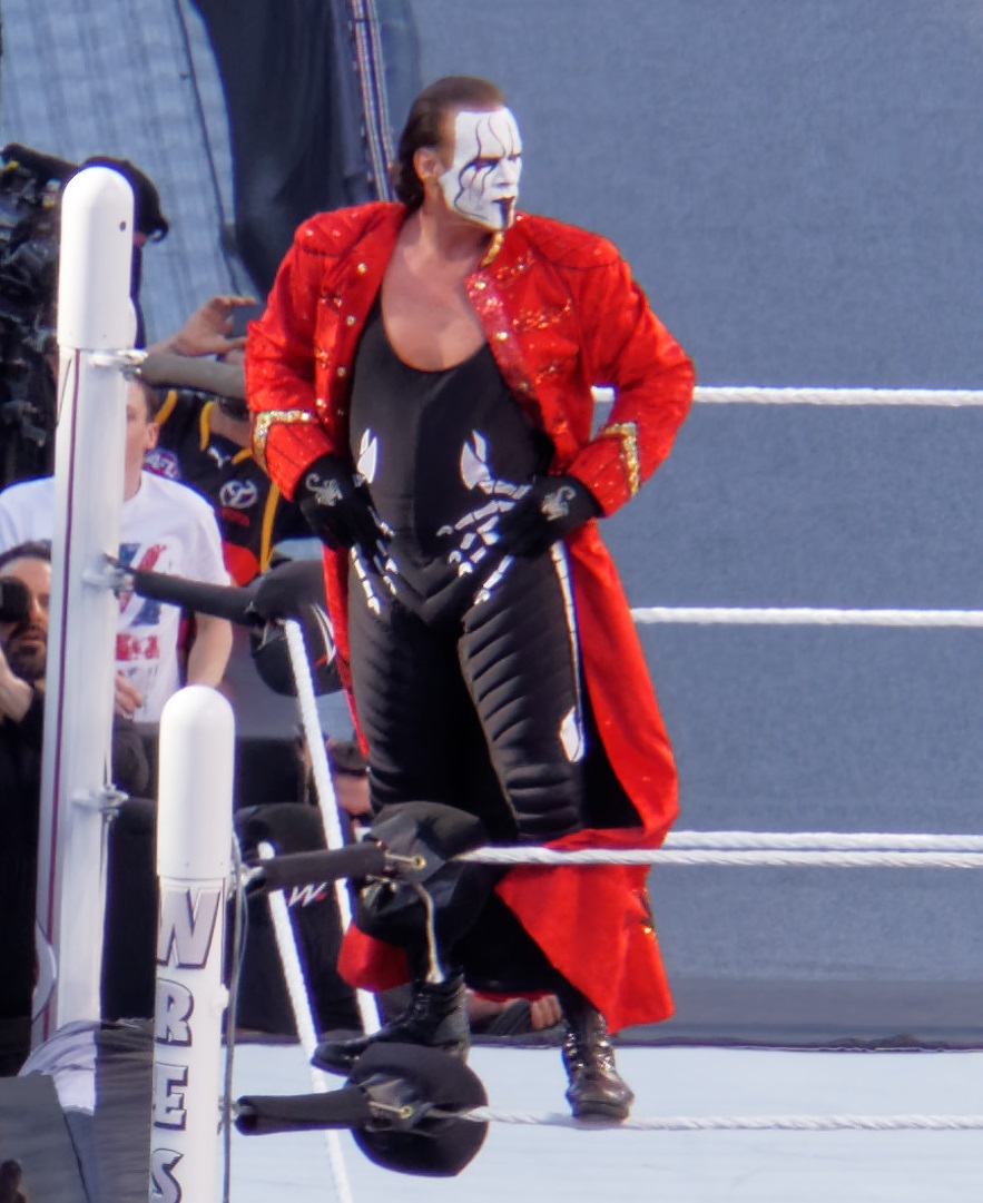 2015-03-29_16-58-57_ILCE-6000_6982_DxO